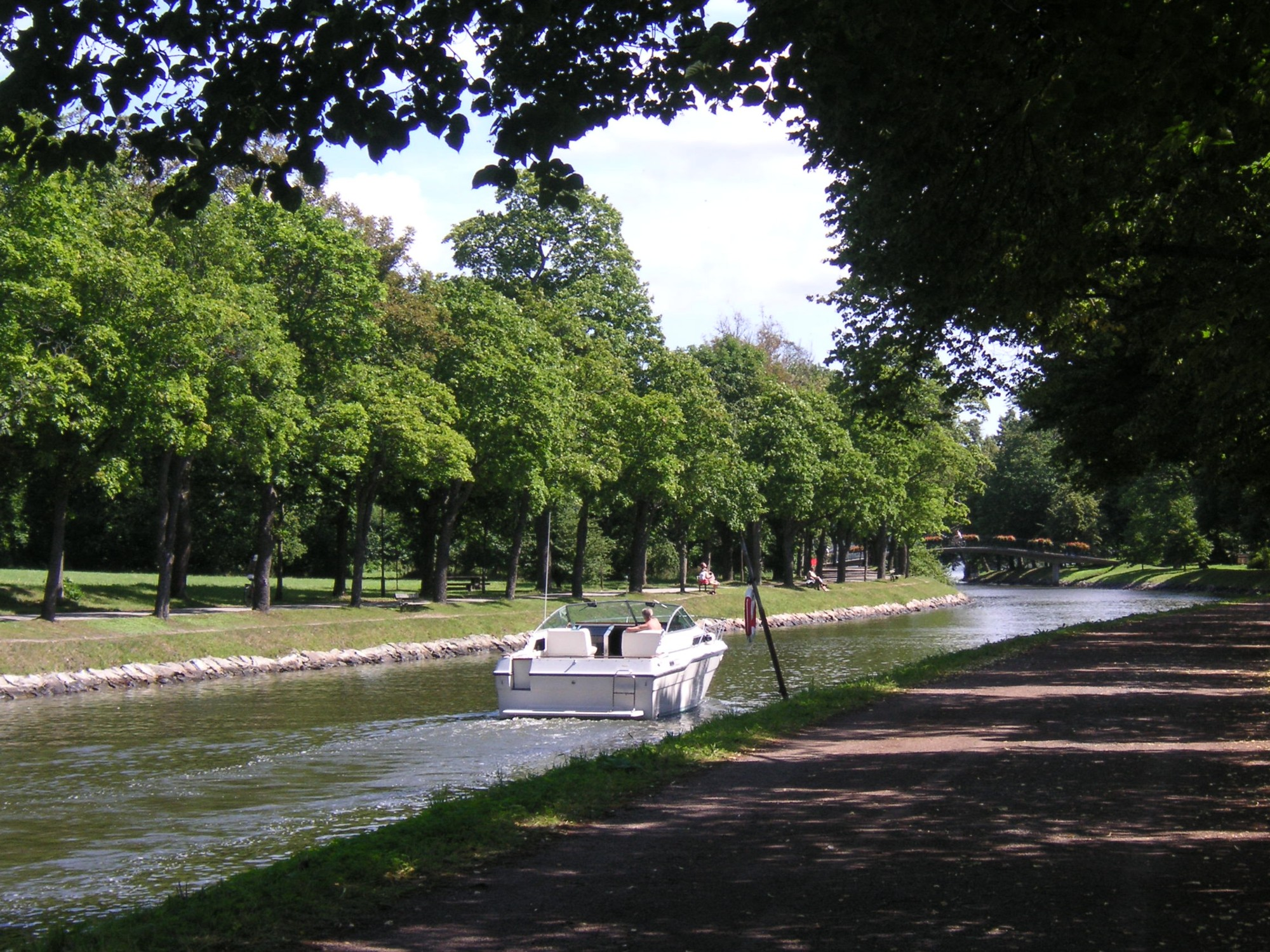 Djurgårdsbrunnskanalen på Djurgården i Stockholm